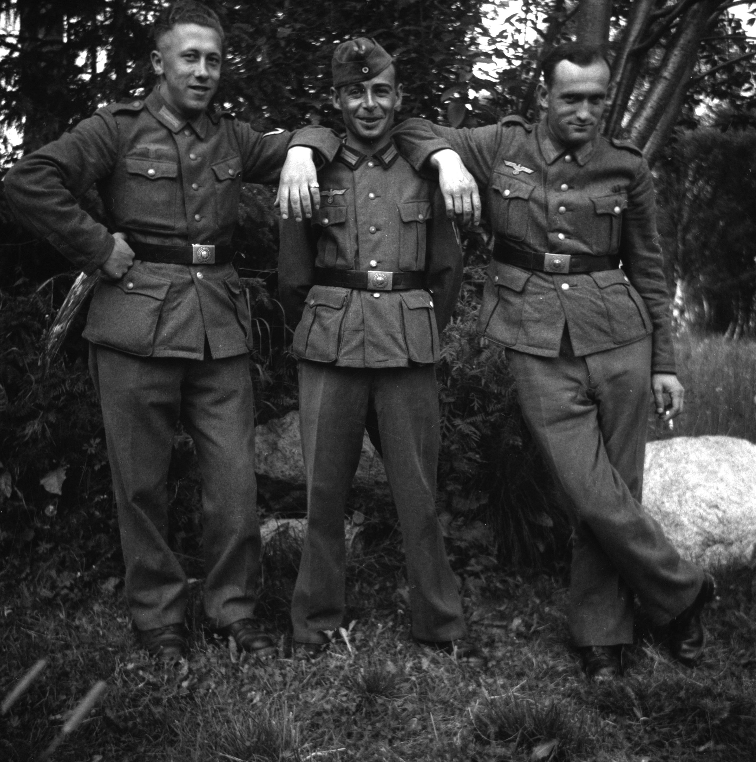 Fotograf: Charles Ravn Avbildet